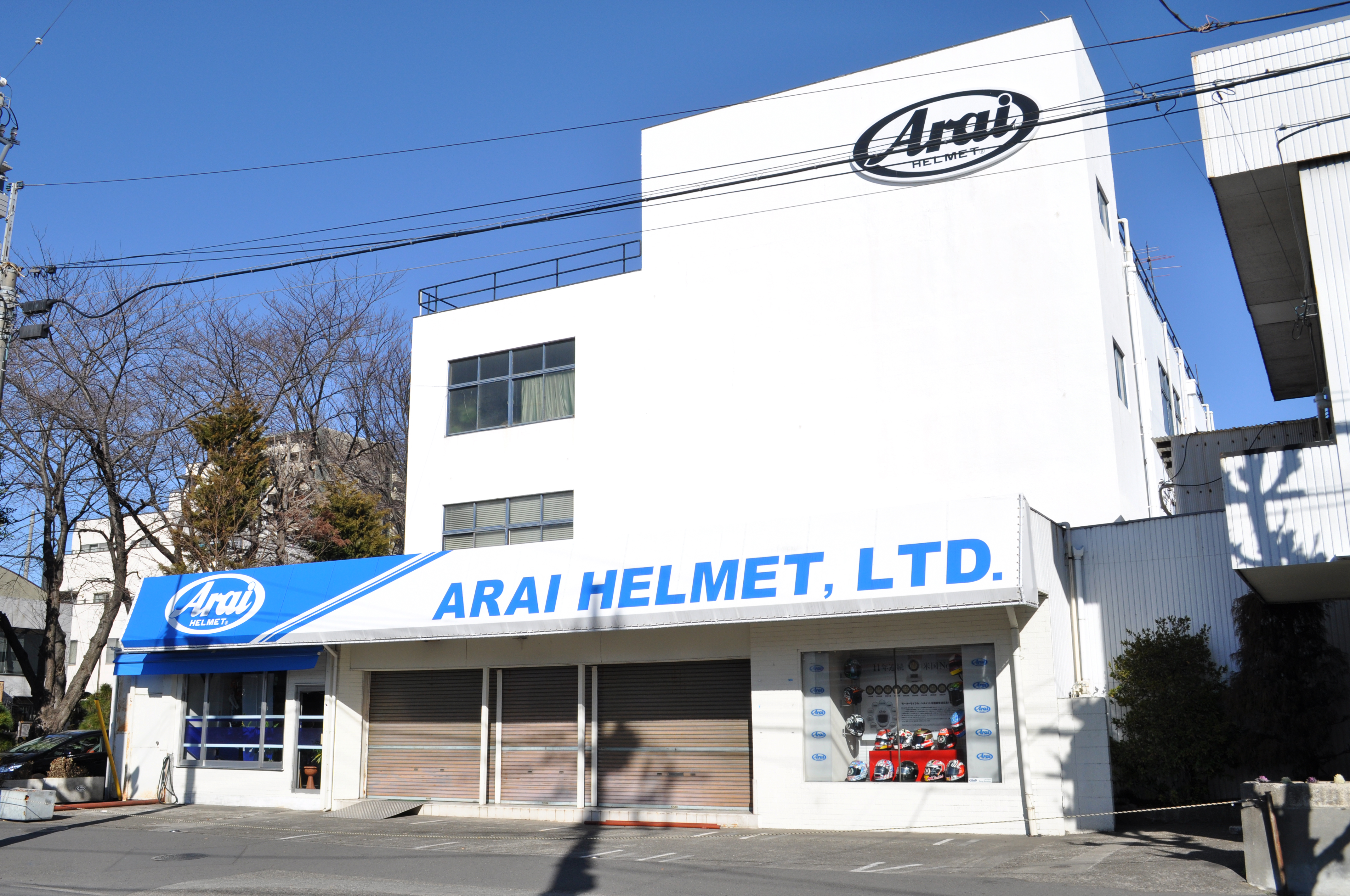 アライヘルメット本社建物